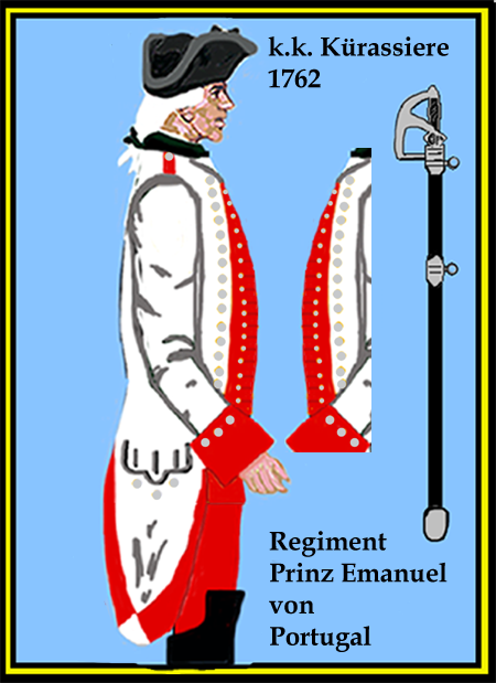 Österreichisches Kürassier-Regiment „Prinz Emanuel von Portugal“ (Aus: L.& F. Funcken - „L'Uniforme et les Armes des soldats de la guerre en dentelle II“) Castermann (Tournai 1976)